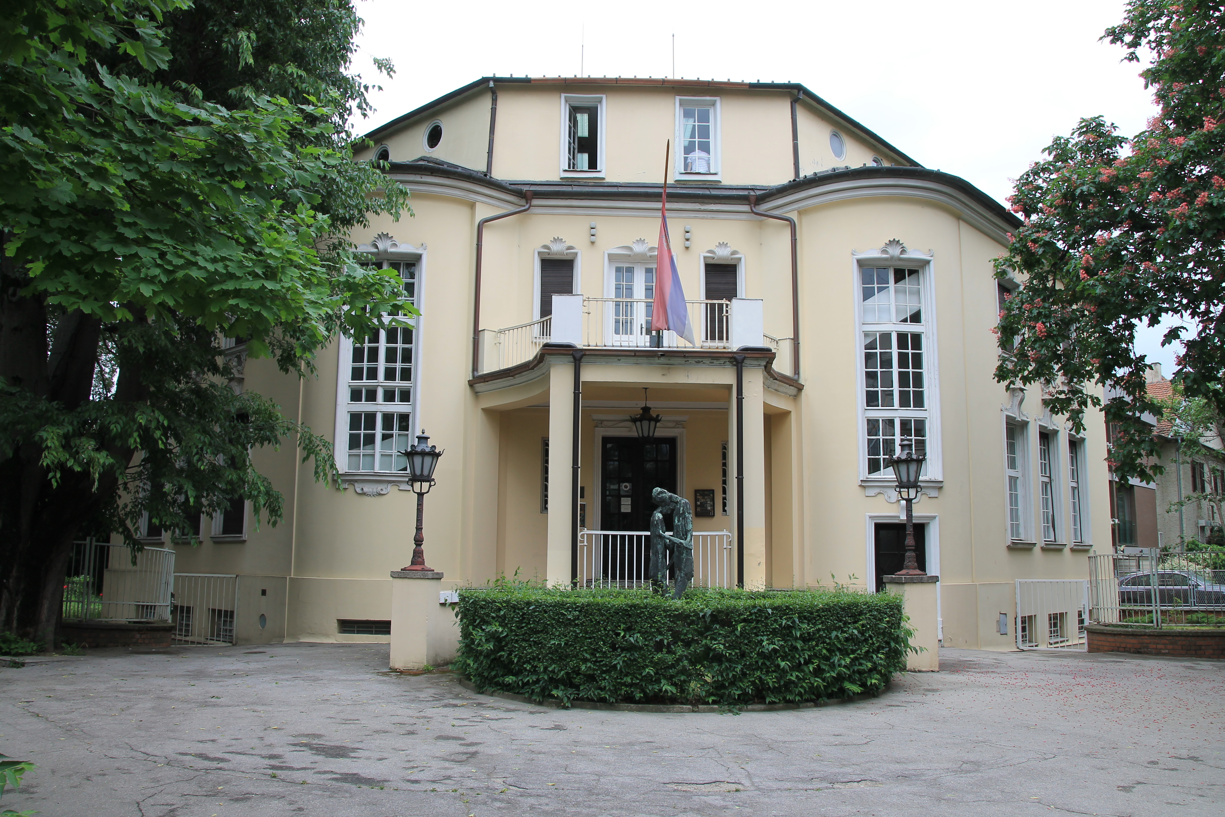 Trg Galerija